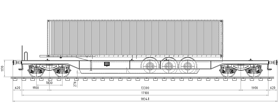 Taschenwagen Sdgmns 743 (T3)